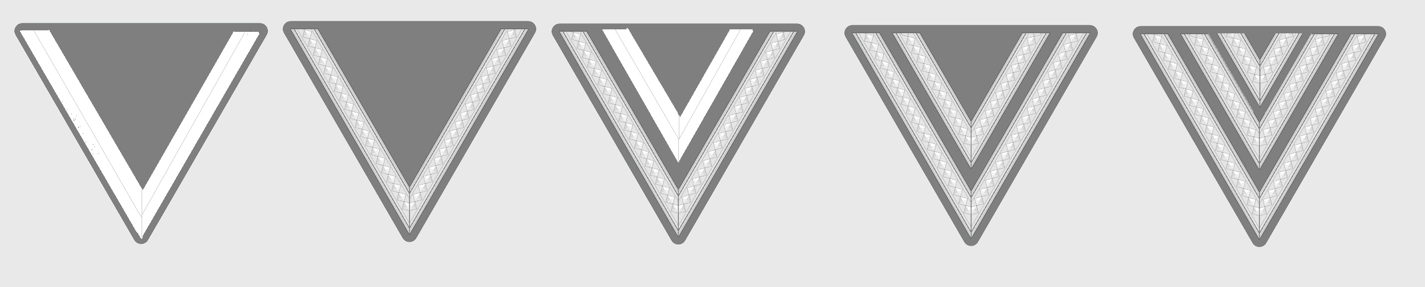 Die Ranabzeichen für Mannschaften und Unteroffiziere, wie sie an der Litewka getragen wurden.